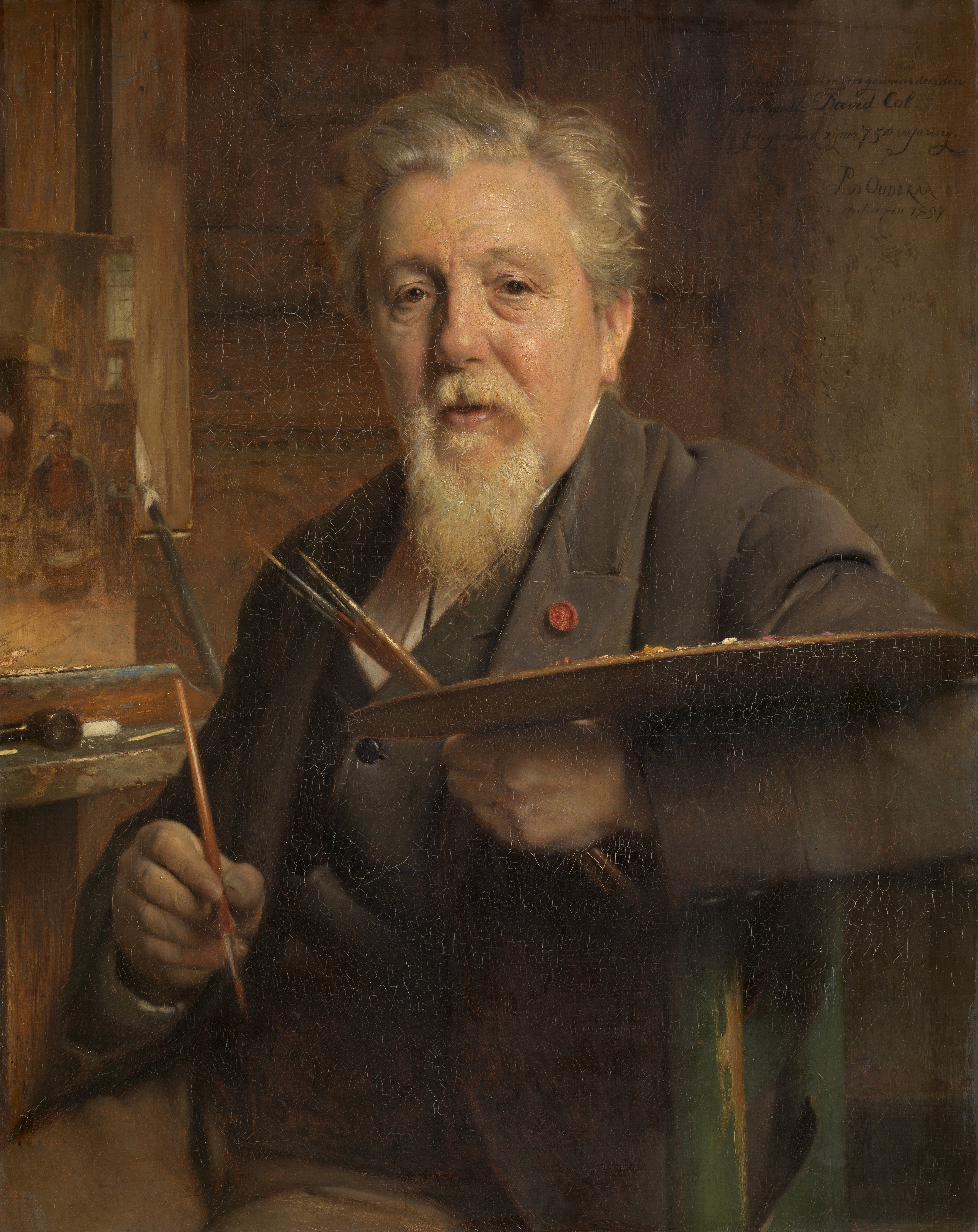 De schilder Jan David Col